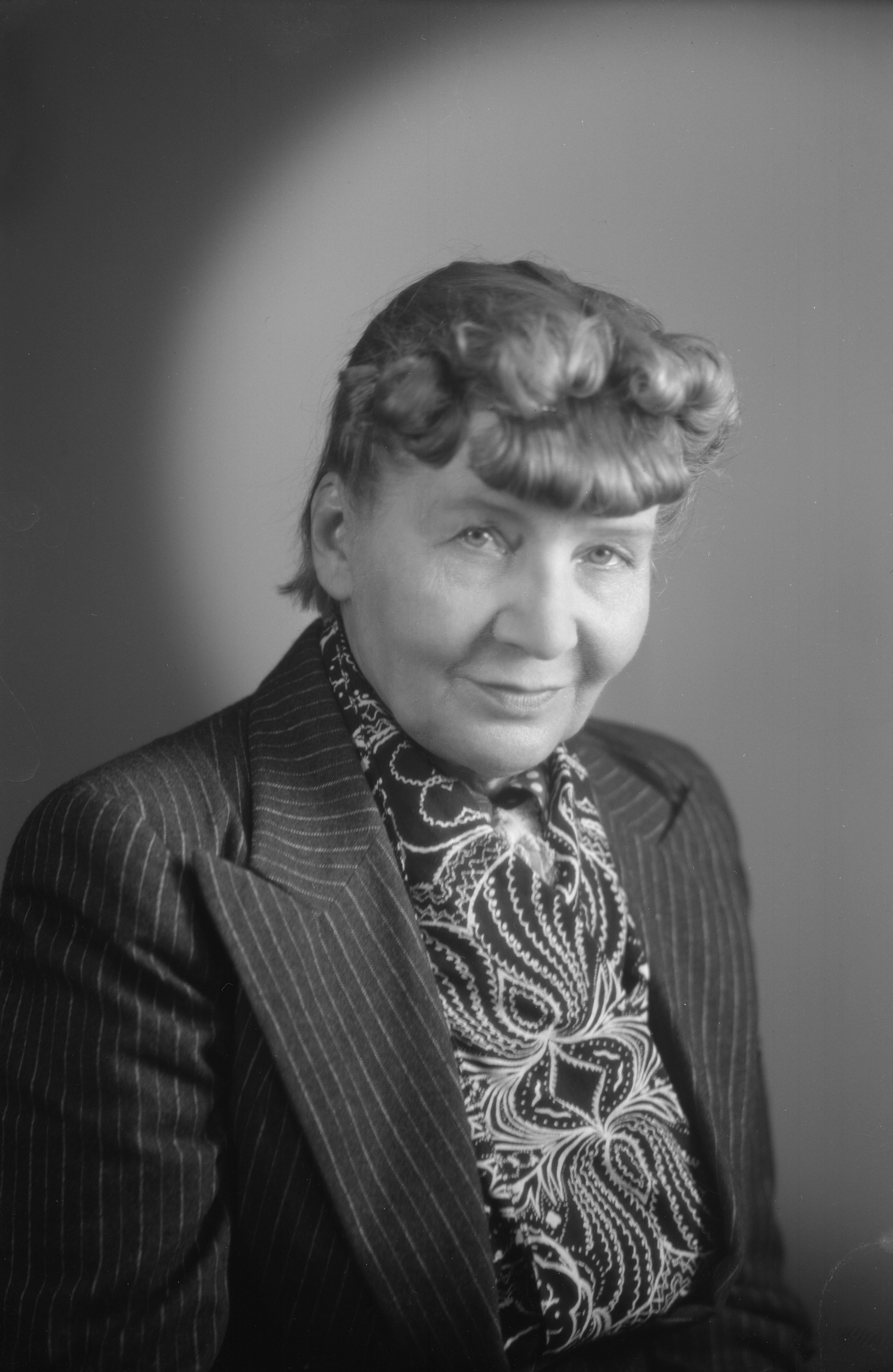 kirjailija Ain’Elisabet Pennanen; pysty, mustavalkoinen